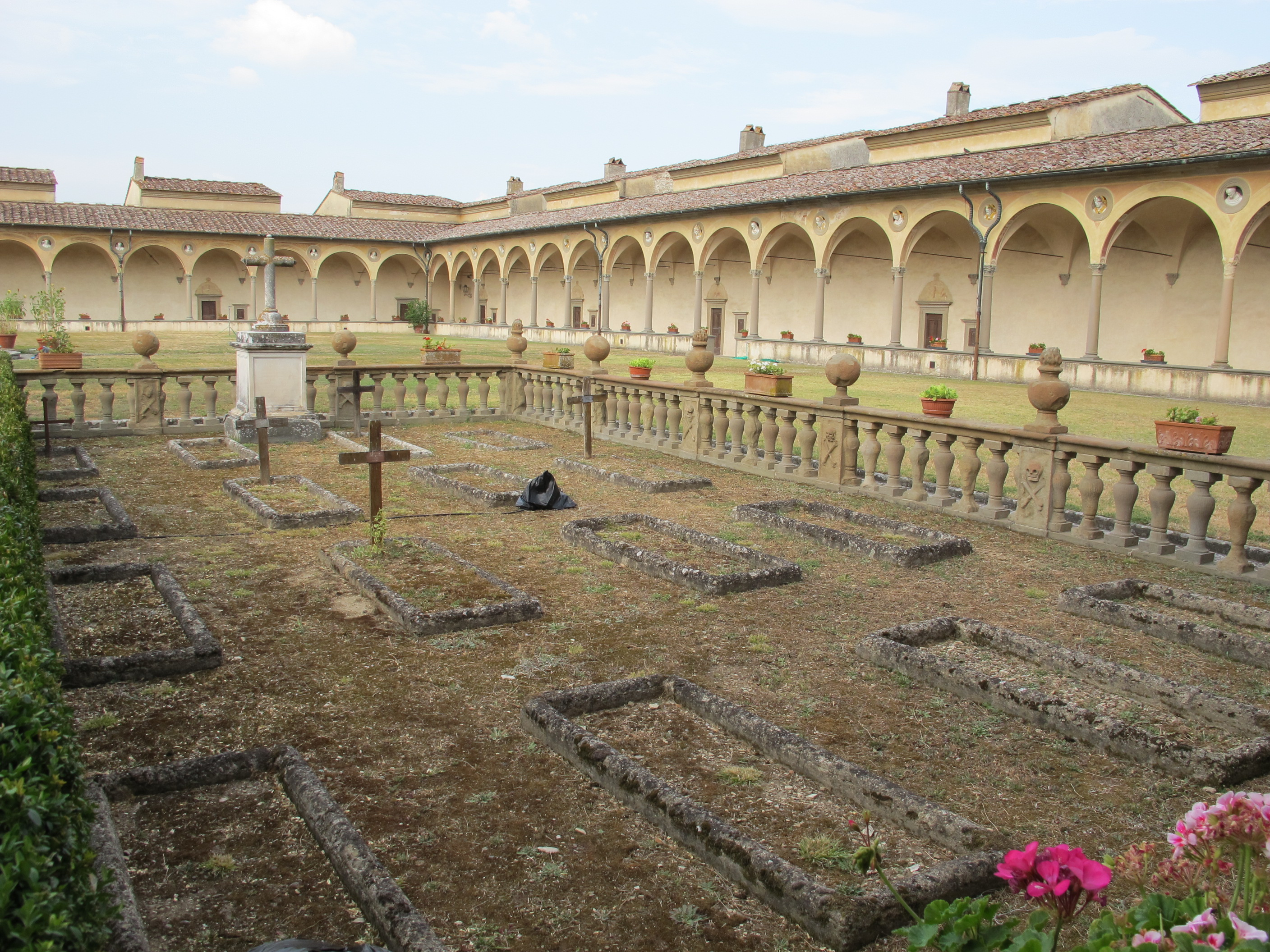 Certosa di fi, chiostro grande 03 cimitero dei certosini